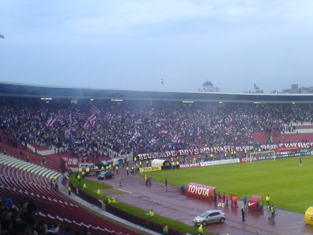 Sever.